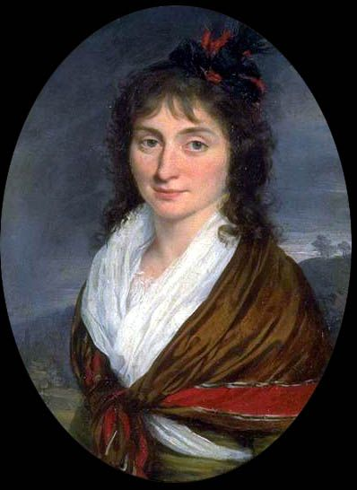 Charlotte de Robespierre représentée de buste.